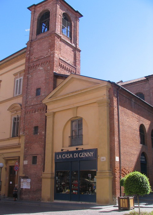 Chiesa di San Paolo ad Asti. Foto scattata da Faberh.